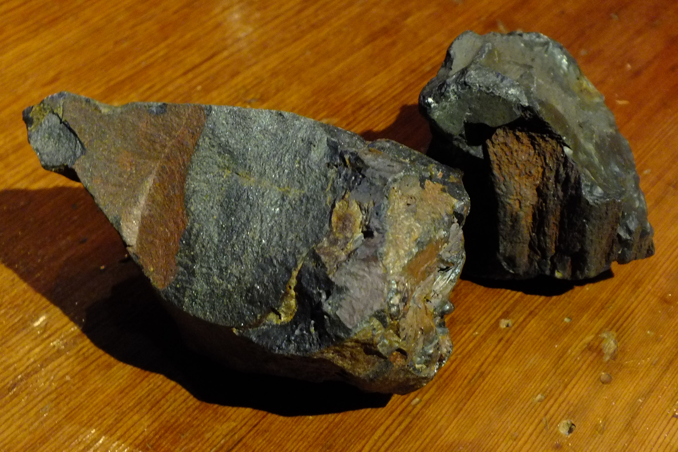 Slag,Inujima,Okayama 犬島精錬所スラグ